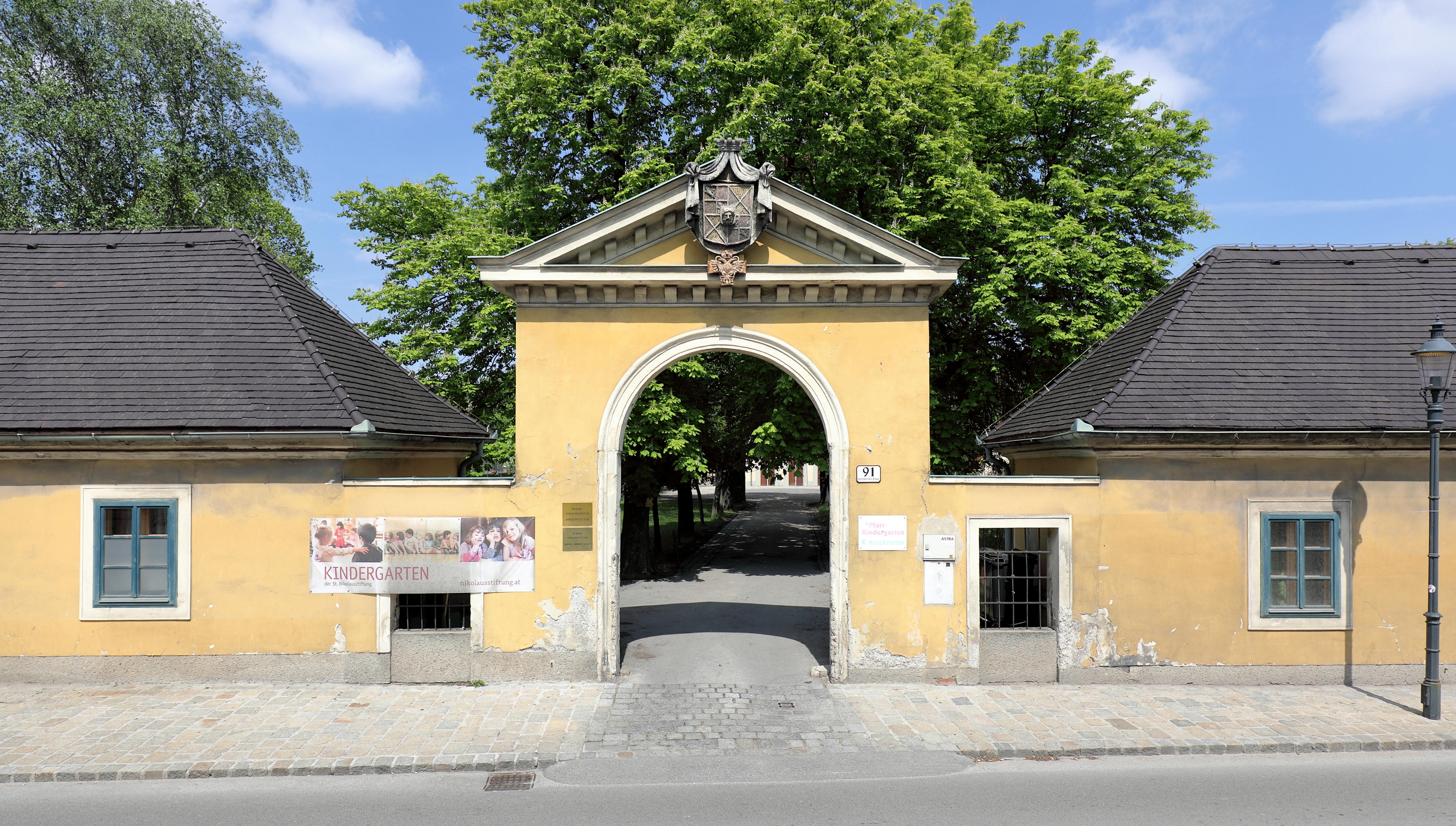 Portal des Schlosses Hirschstetten im 22. Wiener Gemeindebezirk.